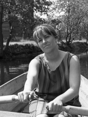 Ur filmen Sjöcharmörer 1939